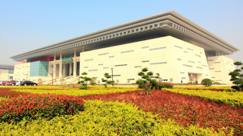 xuchang museum